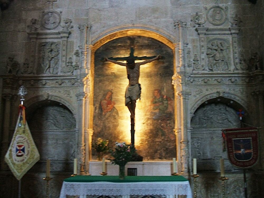 Capilla del Santísimo Cristo de las Santas Gotas (Cristo de Burgos), en la Iglesia de San Gil Abad, Burgos